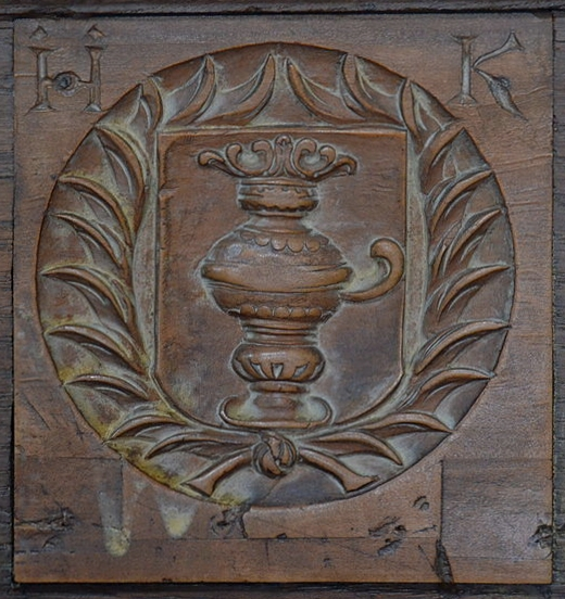 Wappen Johann Jakob Knecht